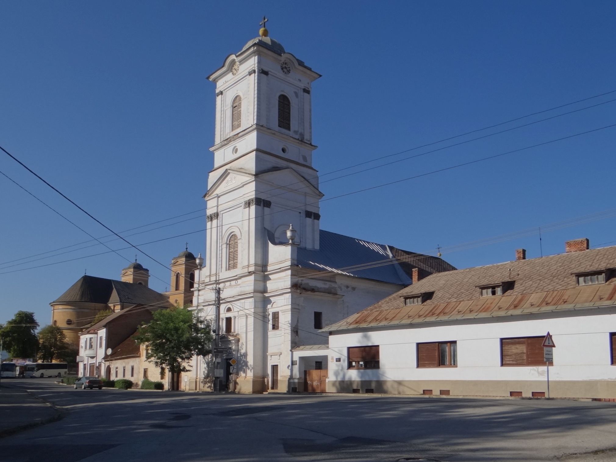 Jelšava